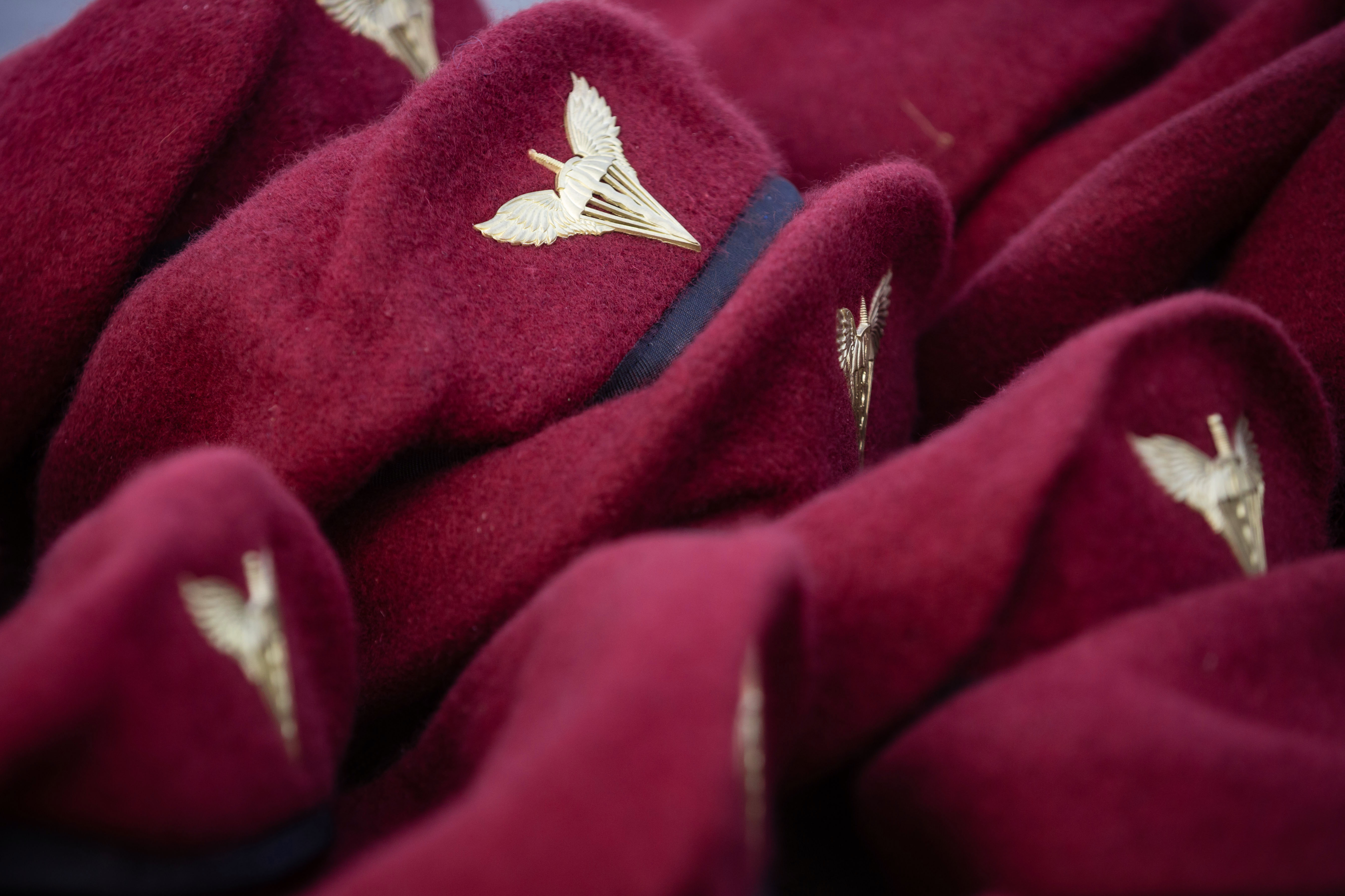 — нові берети, їх кольорова гамма та призначення